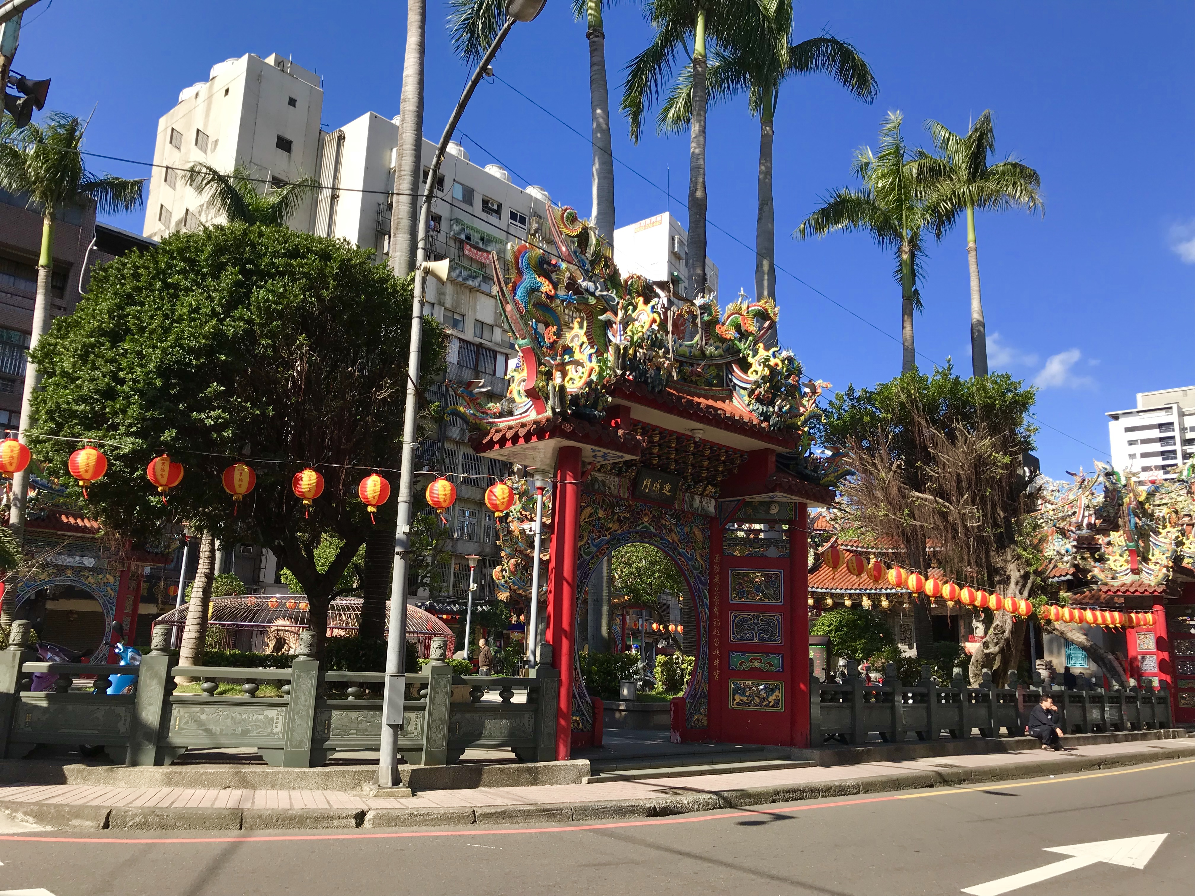 中文（台灣）: 桃園景福宮迎曦門